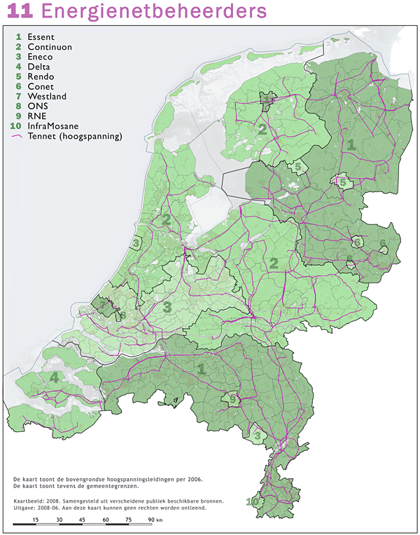 Regionale netbeheerders elektriciteit – regio's van energienetbeheerders, met netwerk van hoogspanningsleidingen in Nederland, situatie 2006 Essent Continuon Eneco Delta Rendo Conet Westland ONS RNE (NRE?) InfraMosane TenneT (hoogspanning)